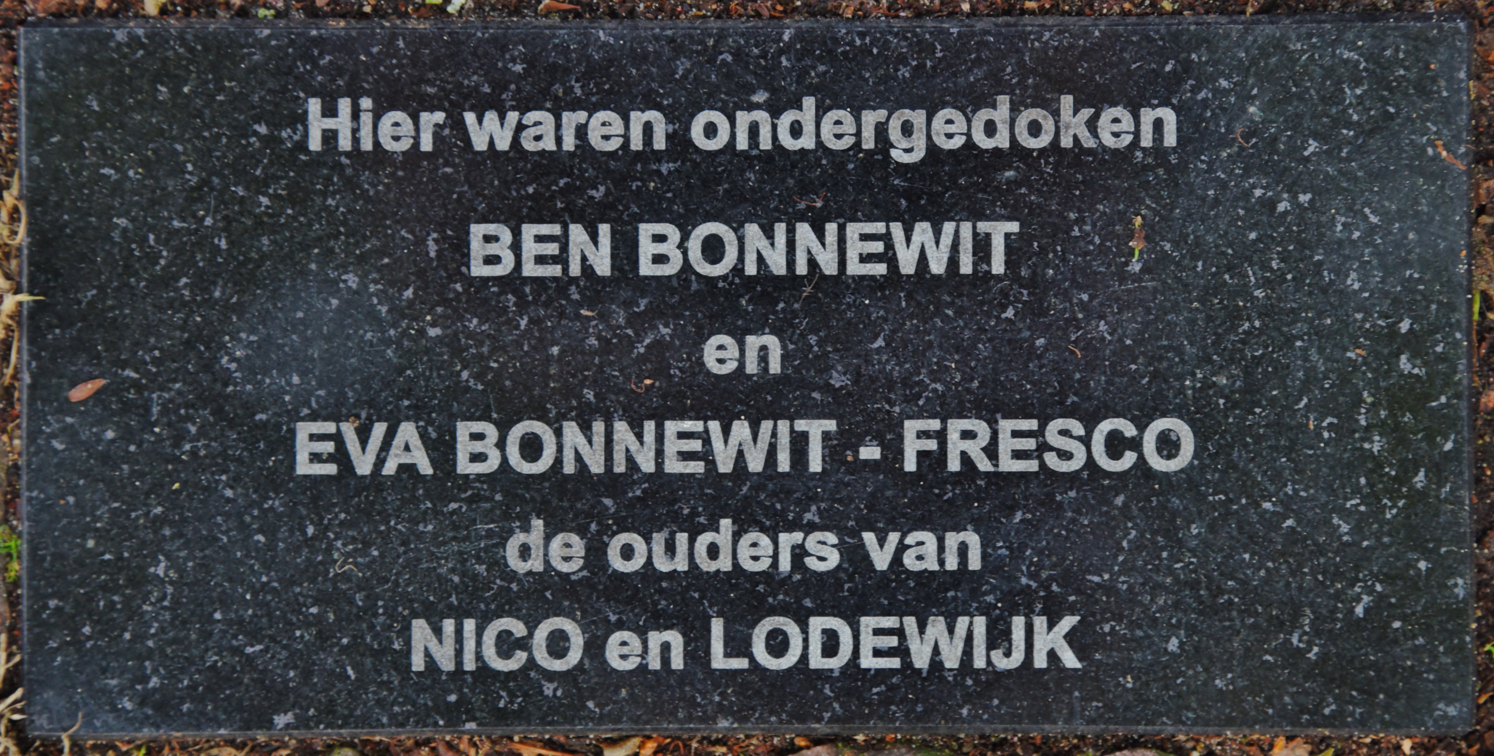 Stolperstein für Alida Josina Sonépouse-Velleman